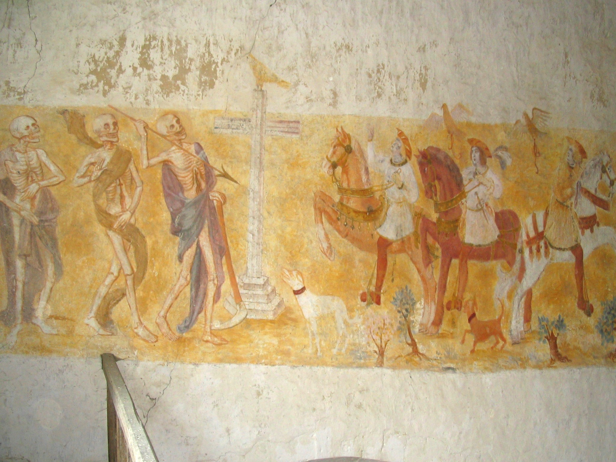 Dict des trois morts et des trois vifs - La Ferté-Loupière - Yonne - France